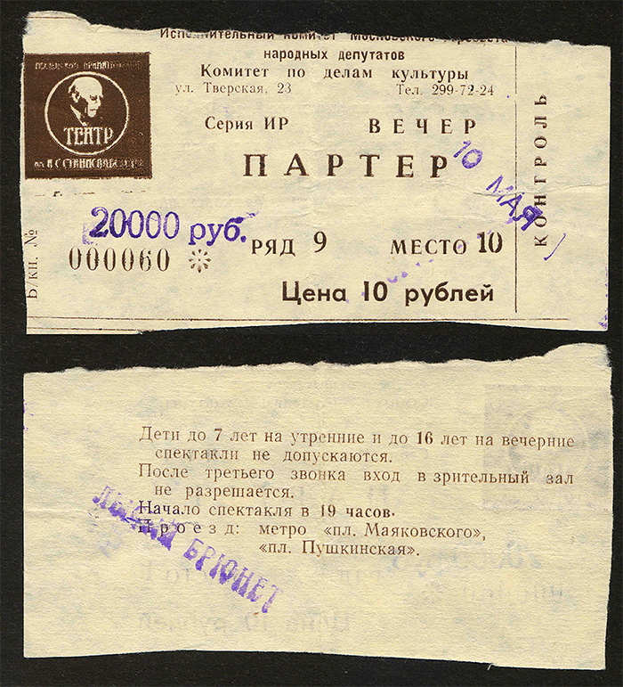 Билет на первый спектакль Петра мамонова "Лысый брюнет"